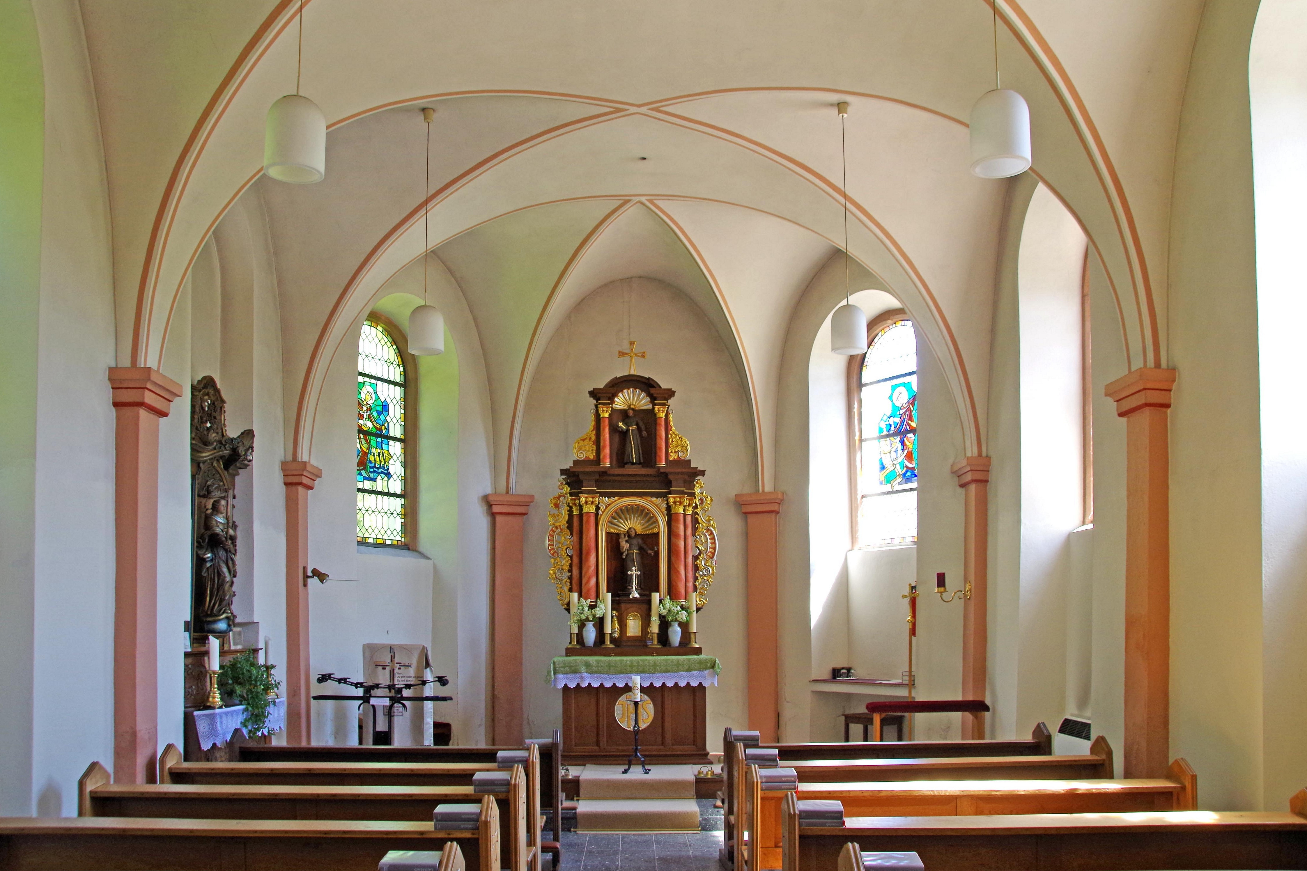 St. Antonius (Balesfeld), Innenraum